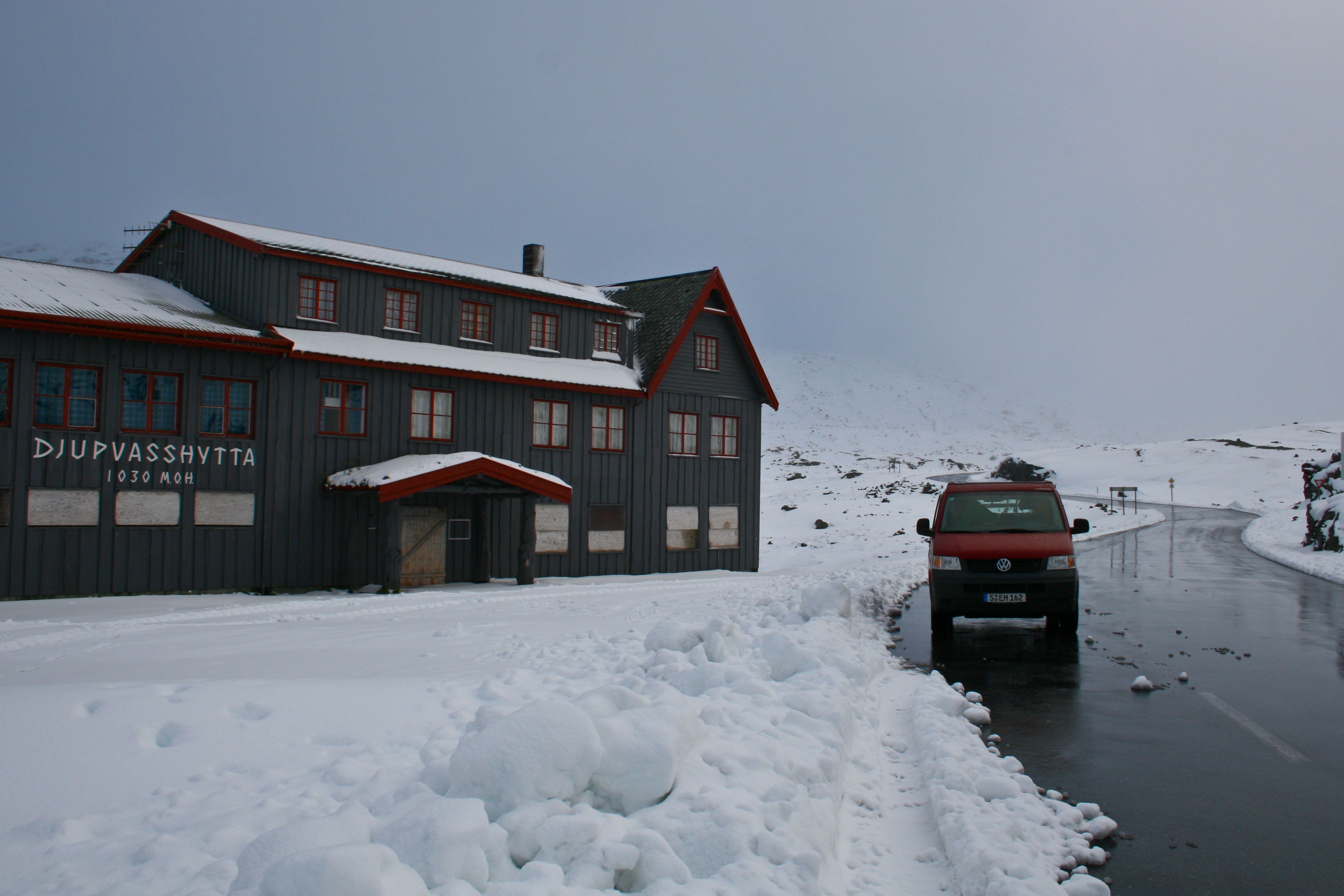 Djupvasshytta ved Riksveg 63